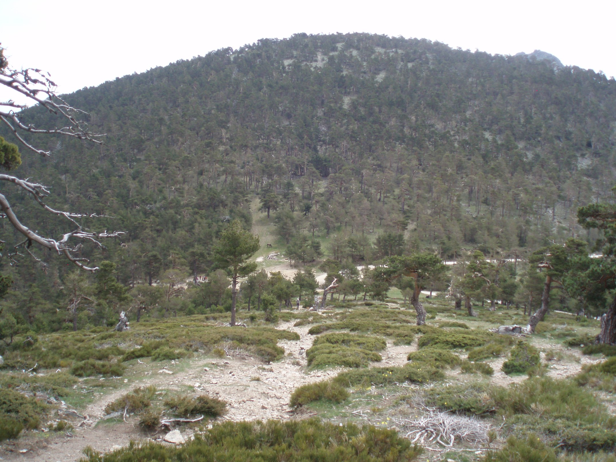 Puerto de la Fuenfría (Sierra de Guadarrama, España).